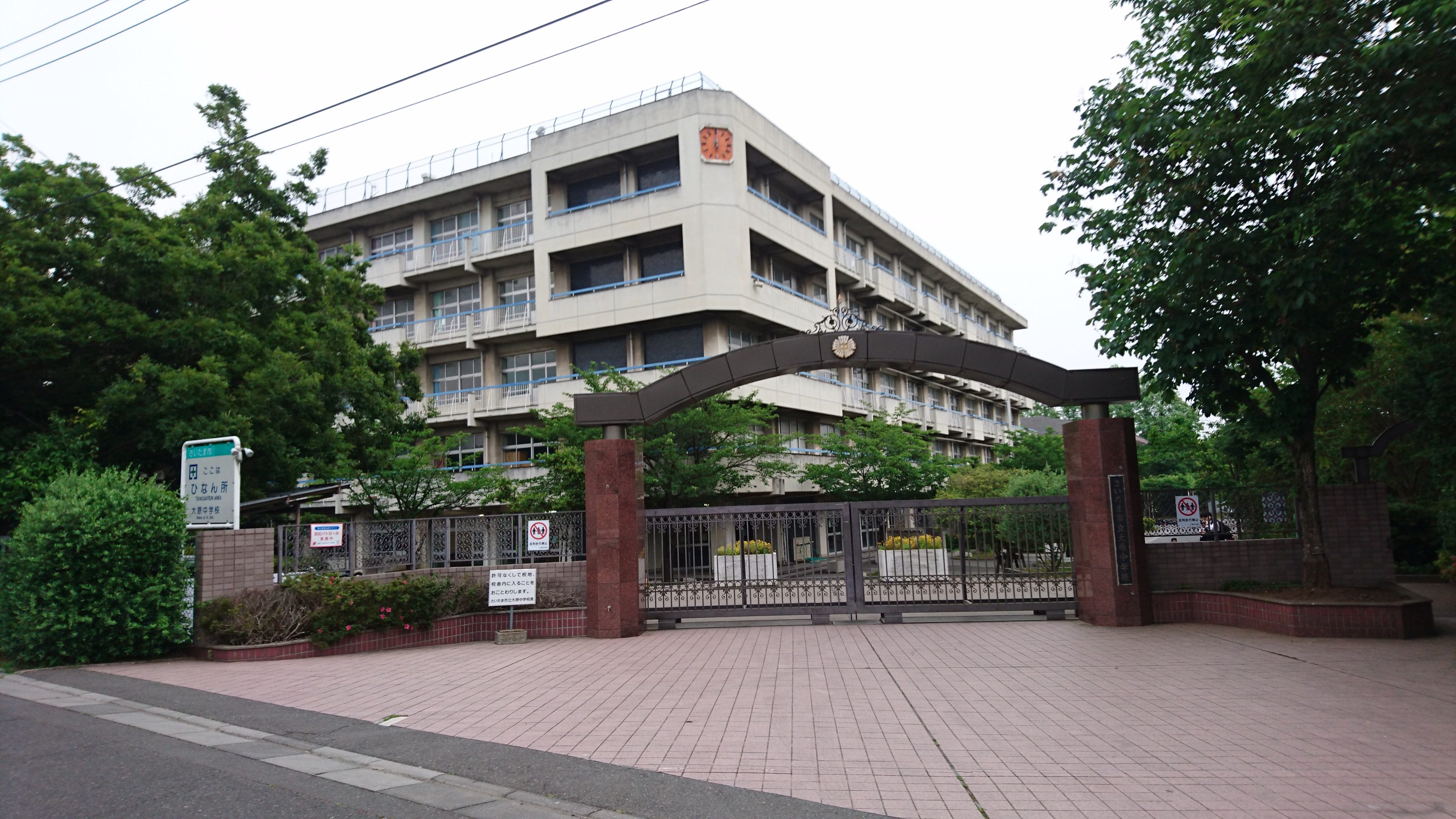 2016年5月25日撮影